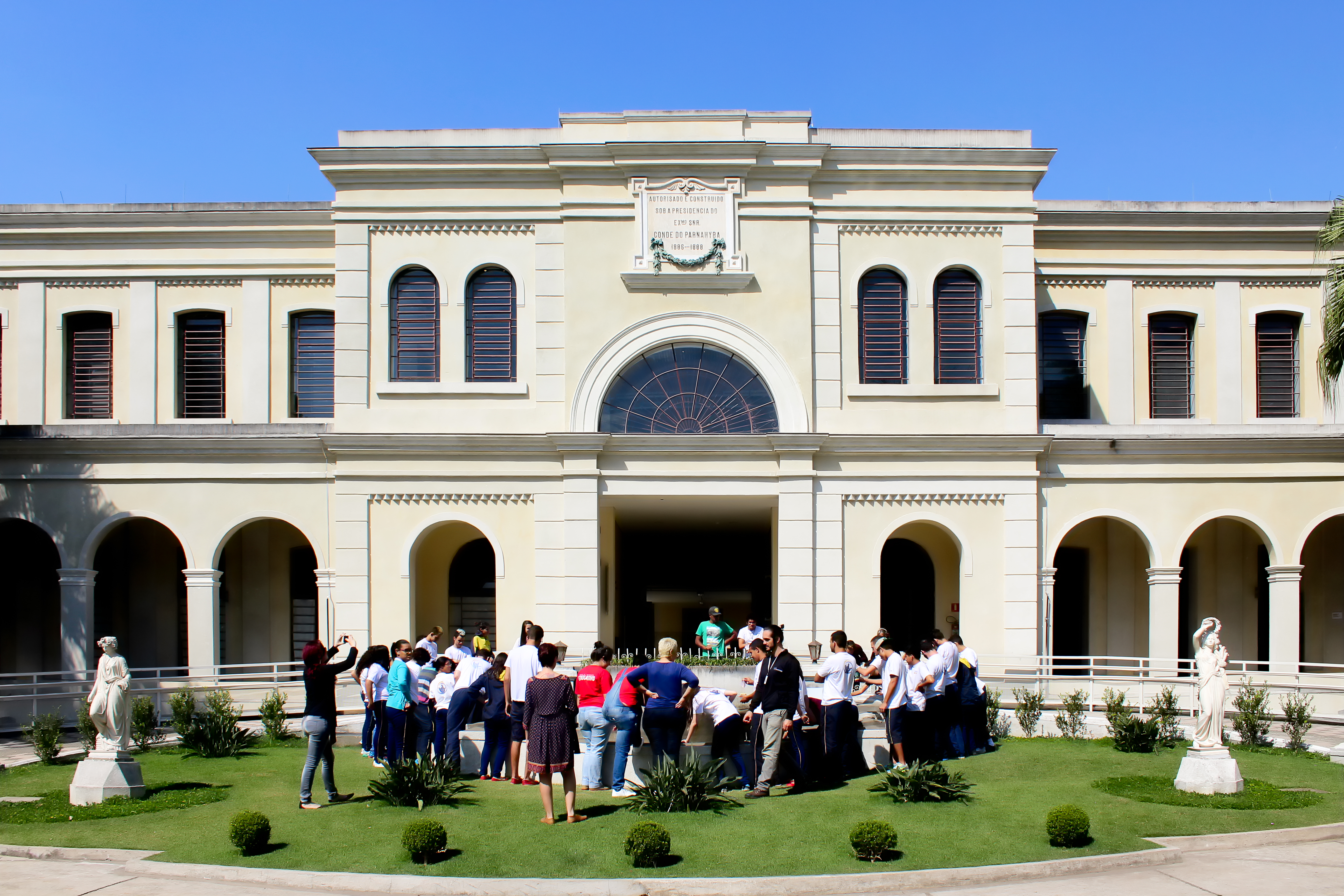 Imagem tirada durante as atividades educativas do Museu da Imigração